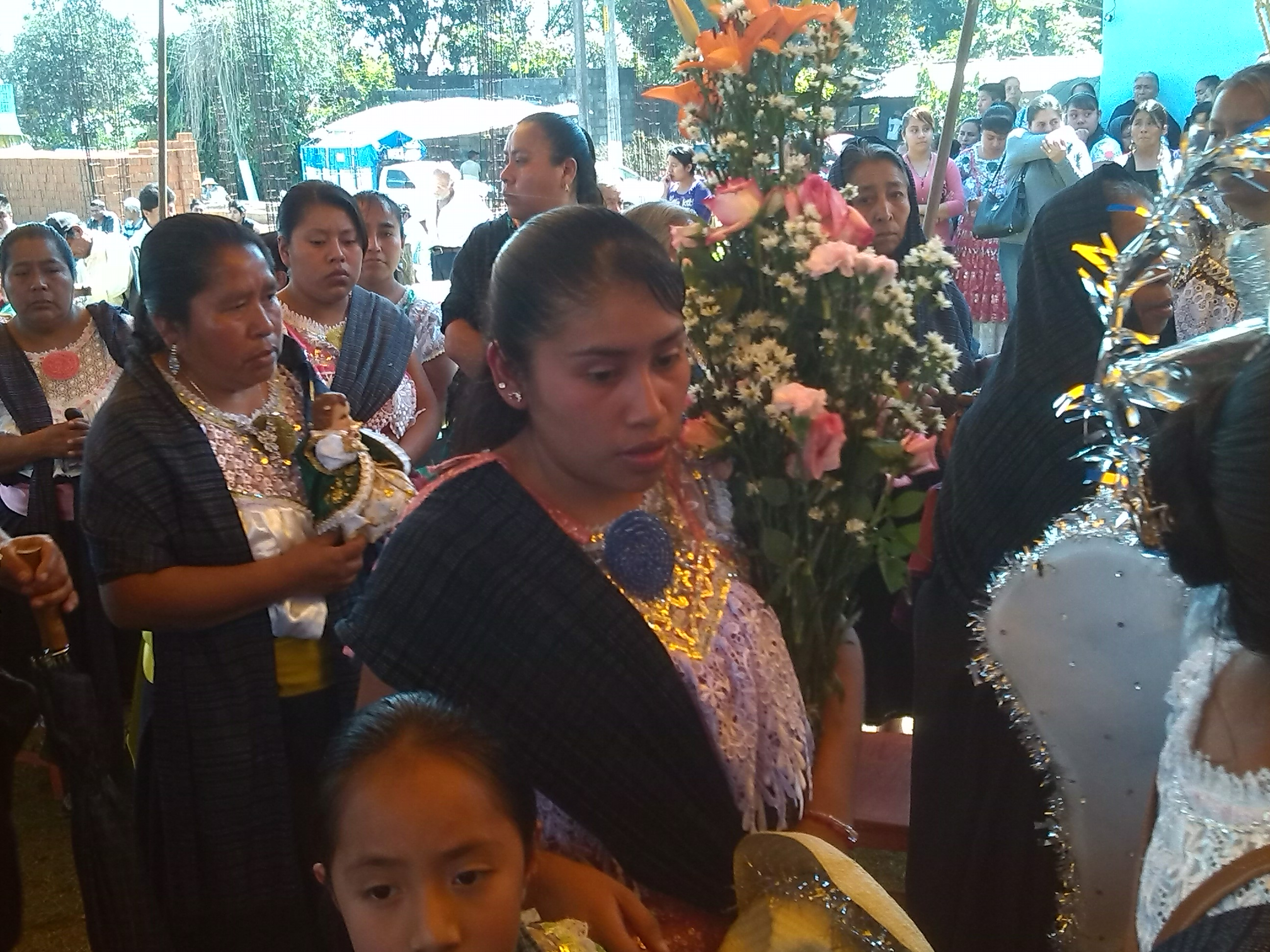 Fiesta de la Candelaria 2 en Ixhuatlancillo